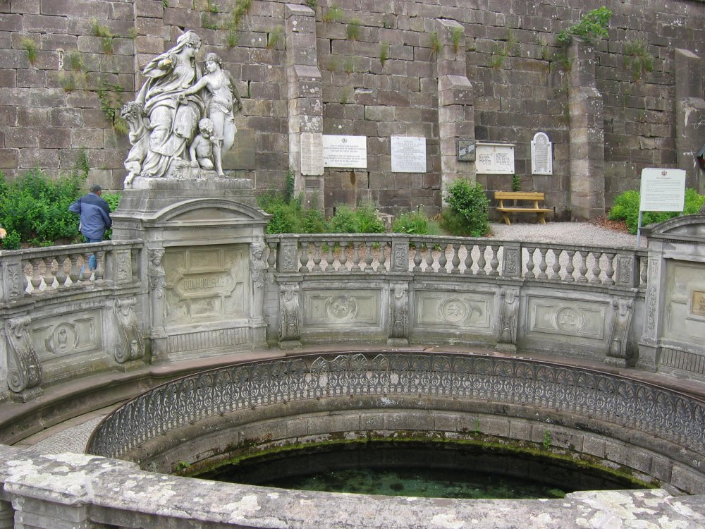 Die symbolische Donauquelle bei Donaueschingen